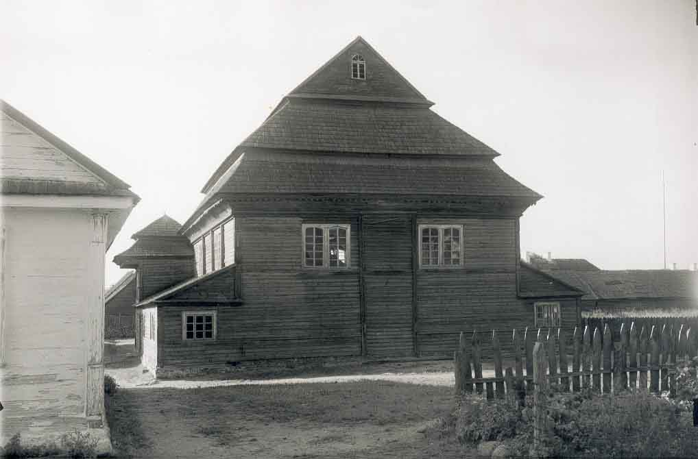 Беларуская (тарашкевіца): Сапоцкін (Sapockin), пляц Сынагогальны (plac Synagogalny). Сынагога